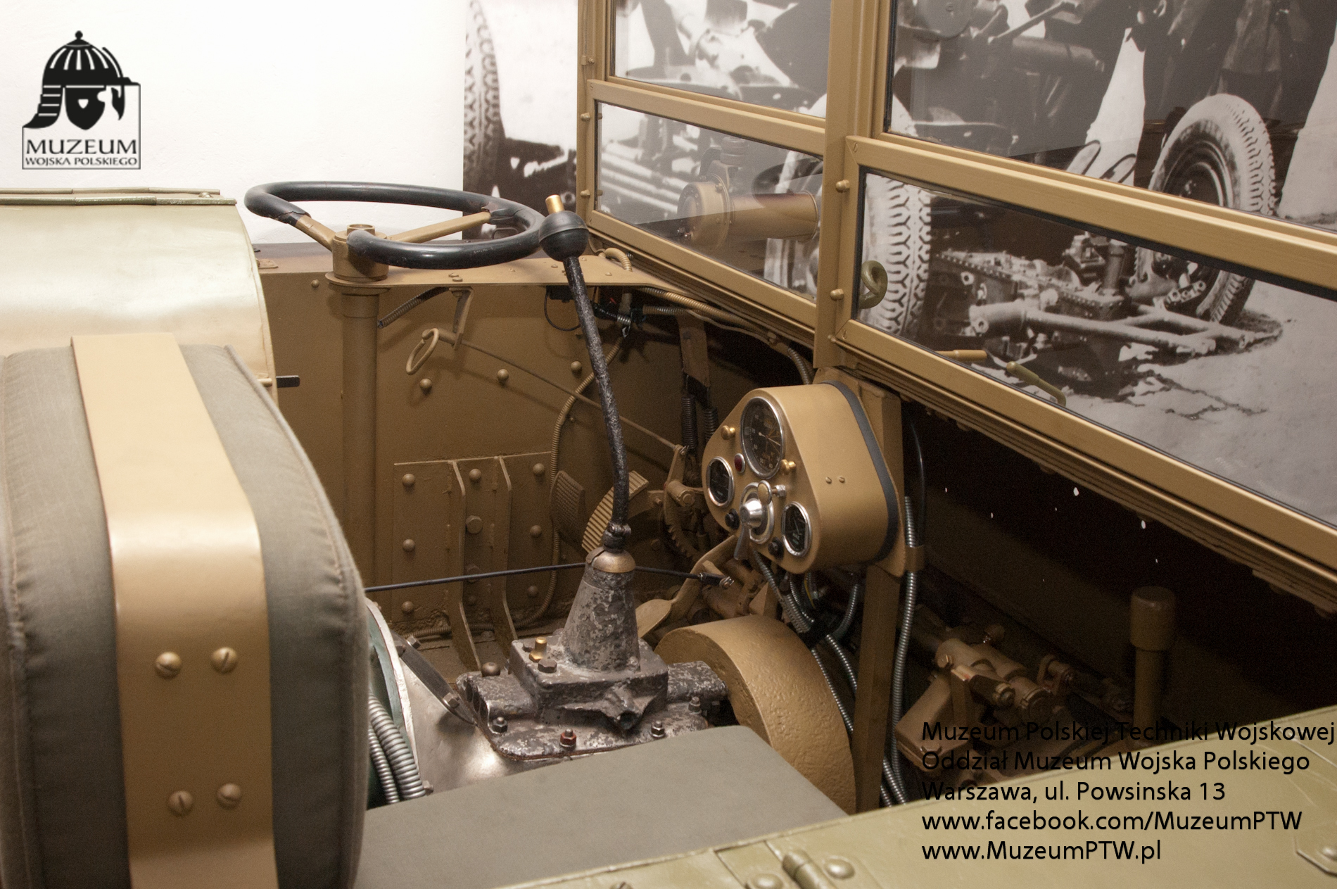 Ciągnik artyleryjski C2P odrestaurowany w 2013 roku, własność Pana Adama Rudnickiego. Wystawa "Wojna 1939. Zrobiliśmy to co do nas należało". Listopad 2014r w Muzeum Polskiej Techniki Wojskowej